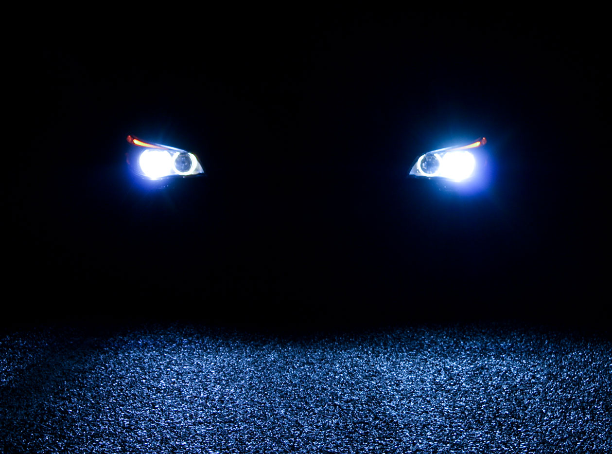 Xenonlicht zur Verwendung in einem BMW PKW-Scheinwerfer.